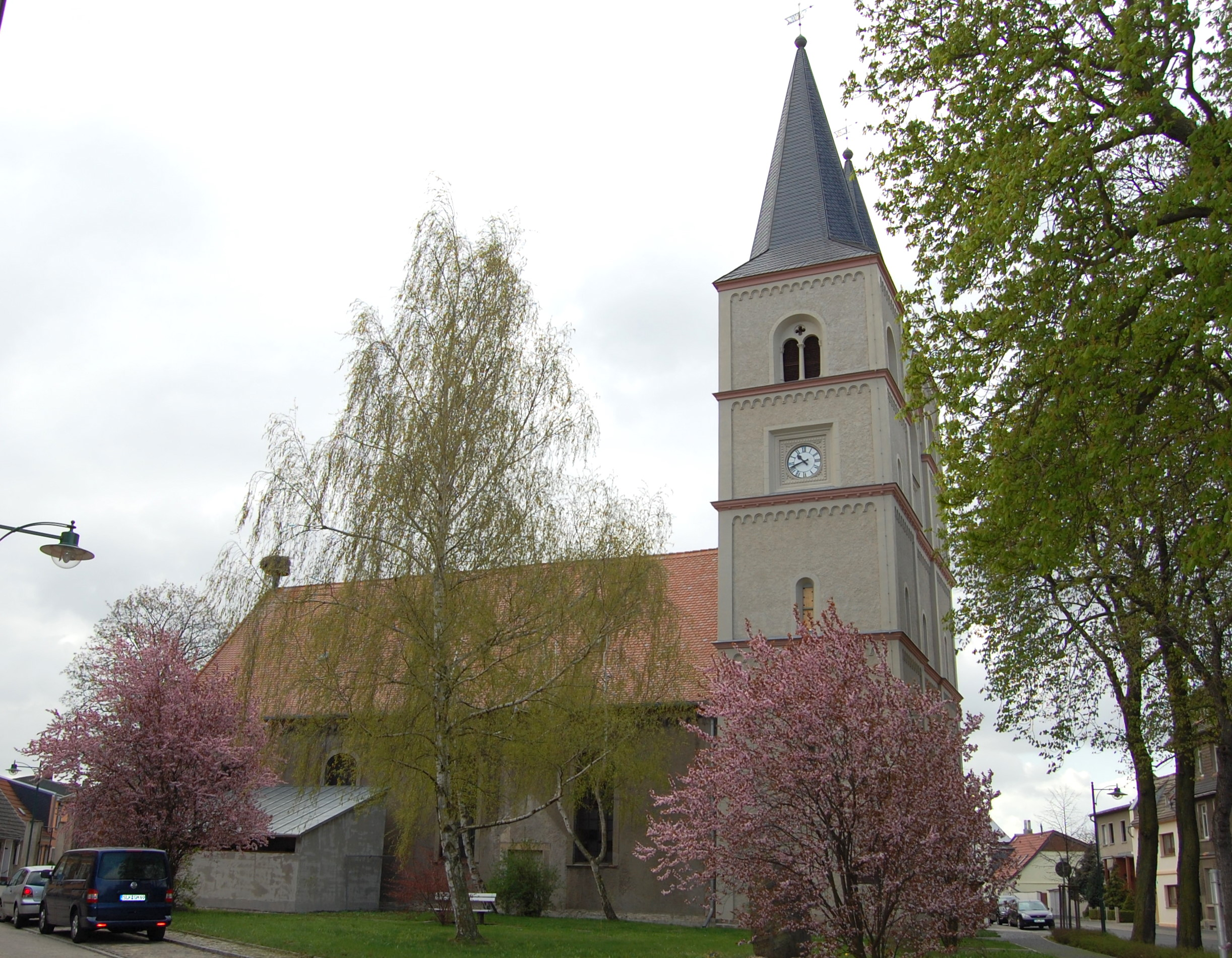 Kirchengebäude in Schönebeck-Frohse, Blick von Norden